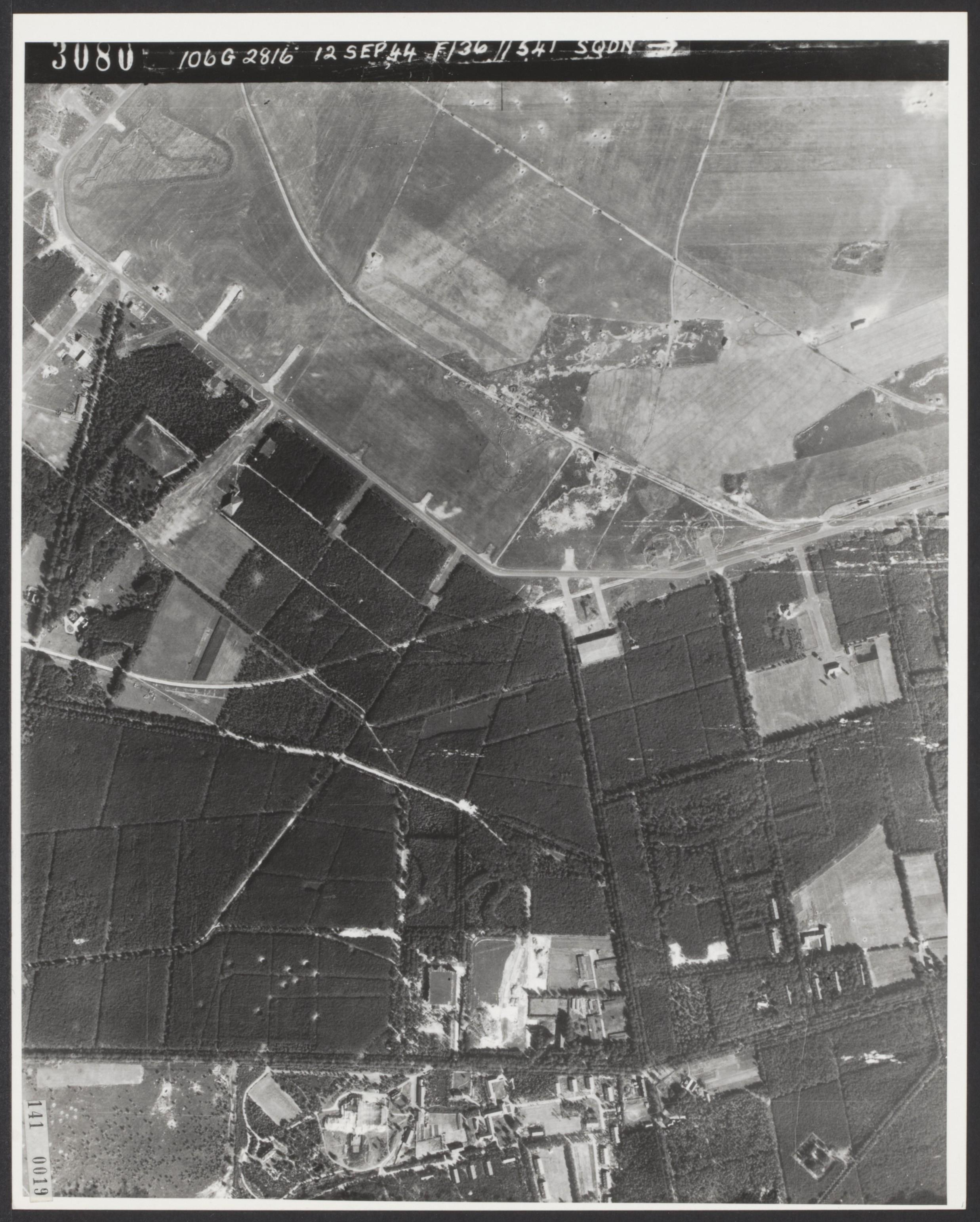 Luchtopname [Operatie Market Garden] [Slag om Arnhem]. In de omgeving van Arnhem (Schaarsbergen) bouwden de Duitsers een grote bunker. Van hieruit regelt de commandopost "Diogenes" heel de Duitse luchtverdediging van Noord-Europa